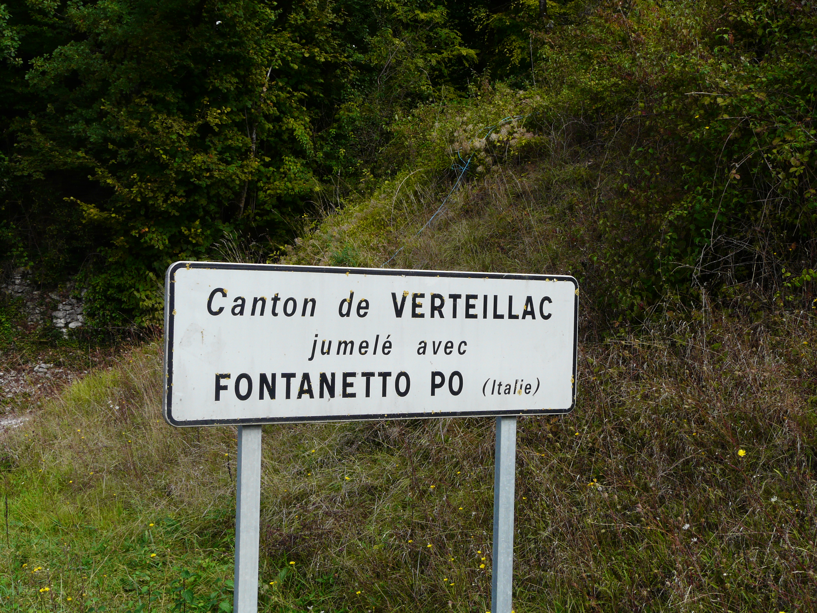 Panneau de jumelage entre les communes du canton de Verteillac et la ville italienne de Fontanetto Po.